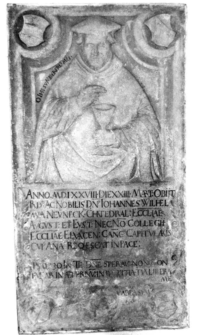 Grablatte des Johannes_Wilhelm_von_Neuneck,_Kanoniker_in_Augsburg_und_Eichstätt